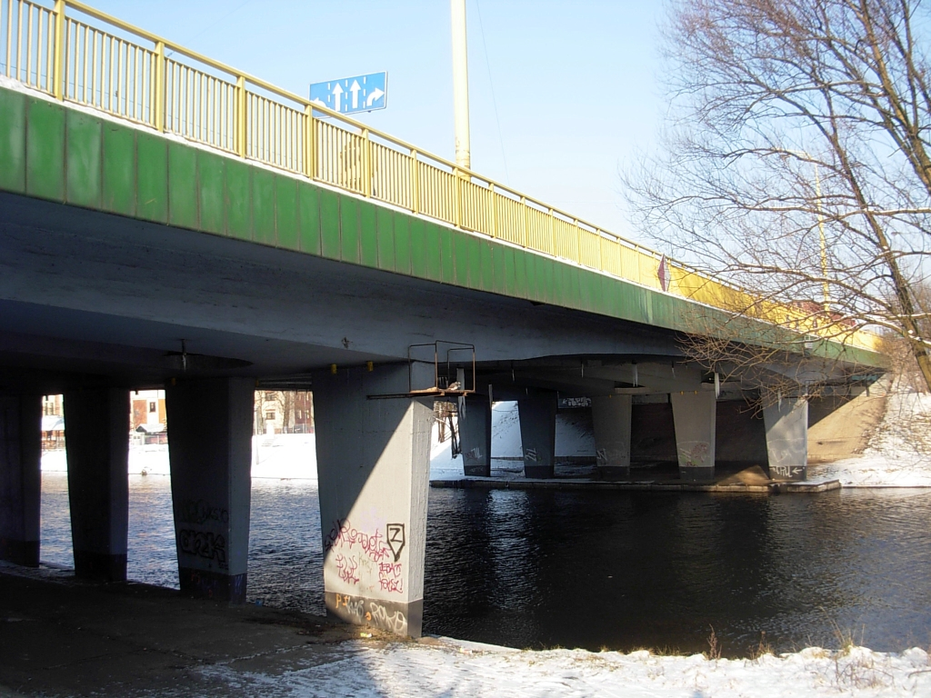 Most Pomorski w Bydgoszczy